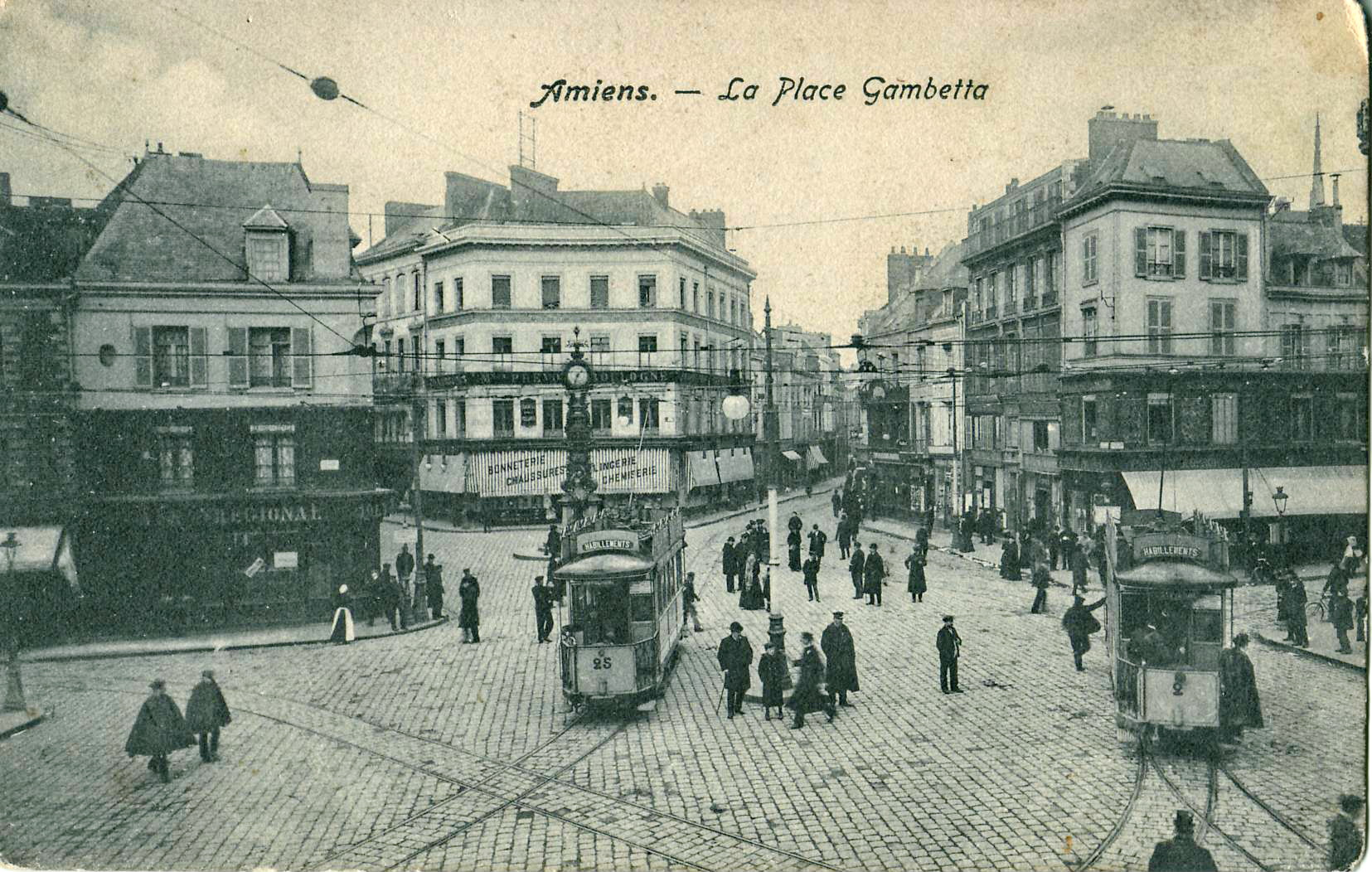 Carte postale ancienne sans mention d'éditeur